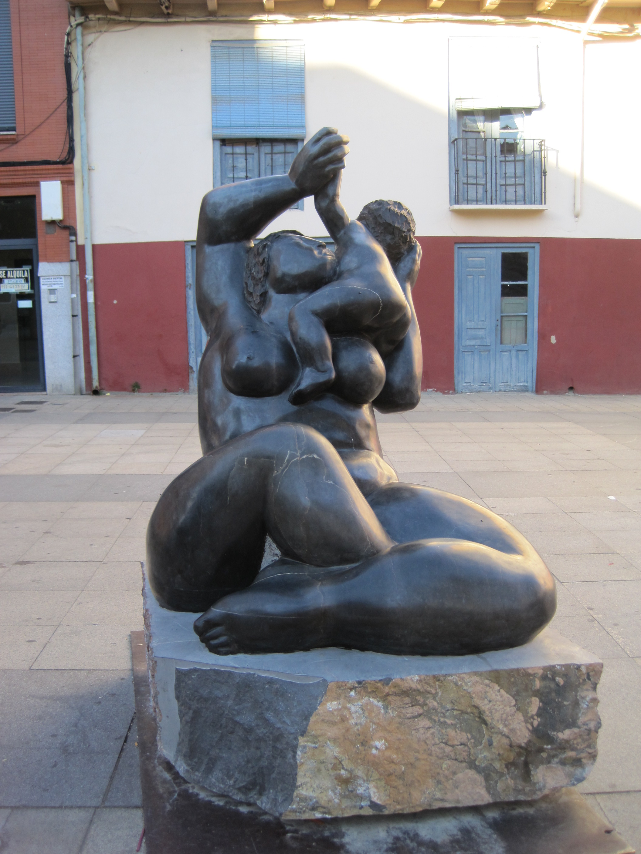 Escultura "Maternidad", obra de Castorina, en Astorga (León, España).